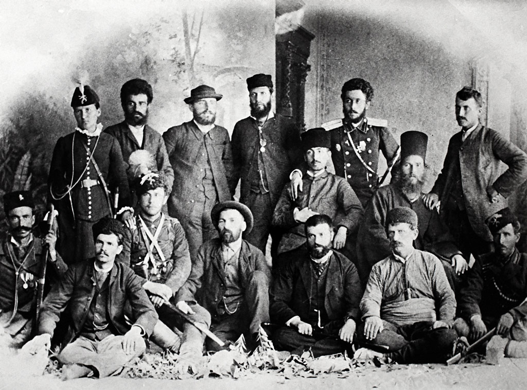 Българският таен централен революционен комитет, 1885 година. Седнали І ред, отляво надясно: Антон Мумджиев, Тодор Гатев, Продан Тишков-Чардафон, Захарий Стоянов, Иван Андонов, Иван Арабаджията, неизвестен. Седнали ІІ ред, отляво надясно: Иван Стоянович-Аджелето и поп Ангел Чолаков. Прави, отляво надясно: Недялка Шилева, Спиро Костов, Димитър Ризов, Петър Зографски, майор Коста Паница, Спас Турчев. Пловдив, Източна Румелия, лято 1885 г..